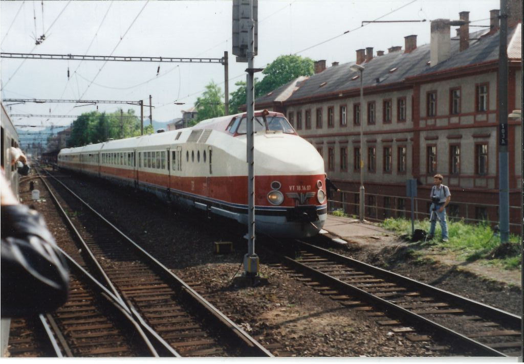 VT 18.16.01 während einer Sonderfahrt im Bahnhof Decin h.l.n